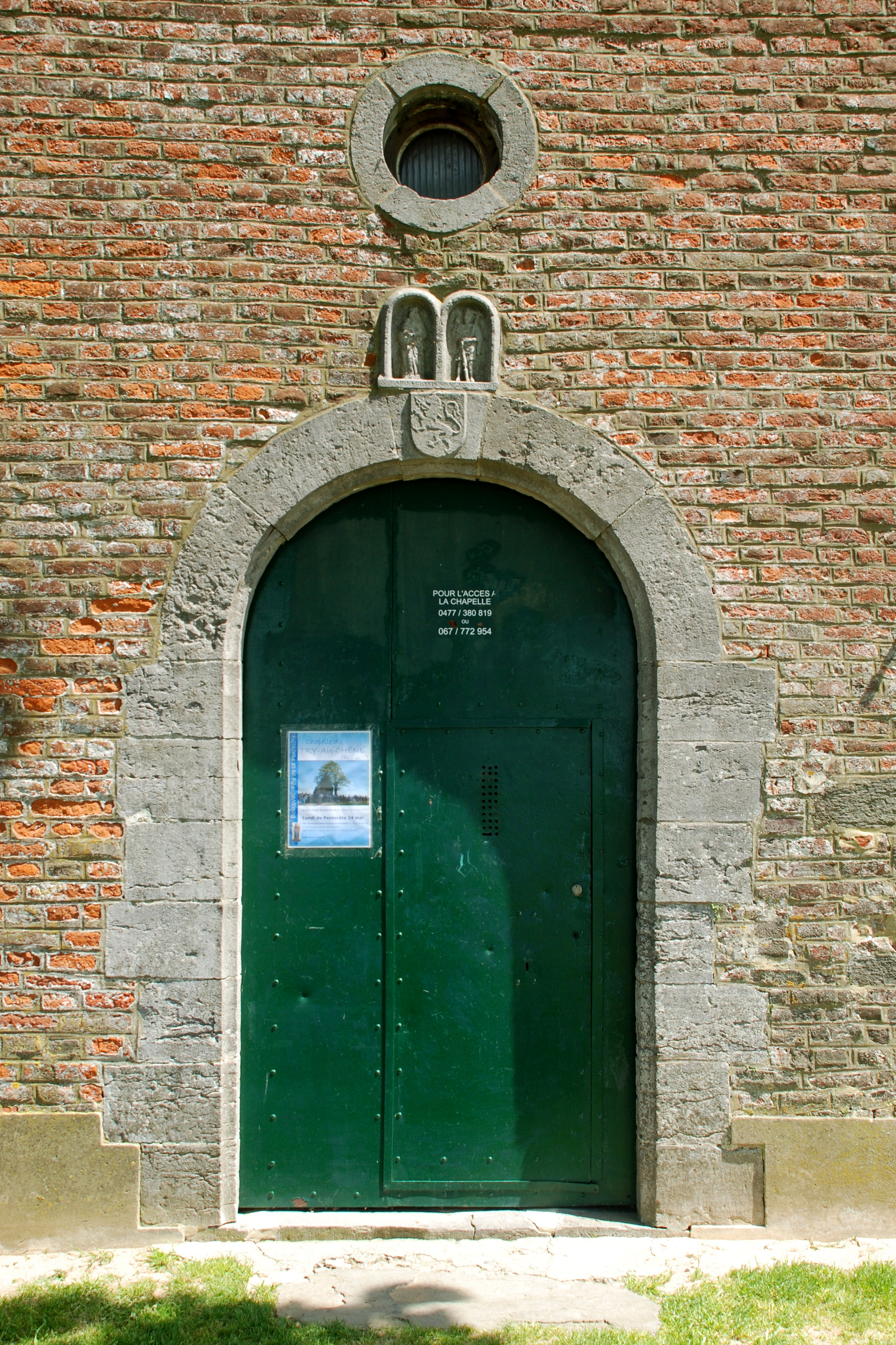 Belgique - Bousval - Chapelle du Try-au-Chêne